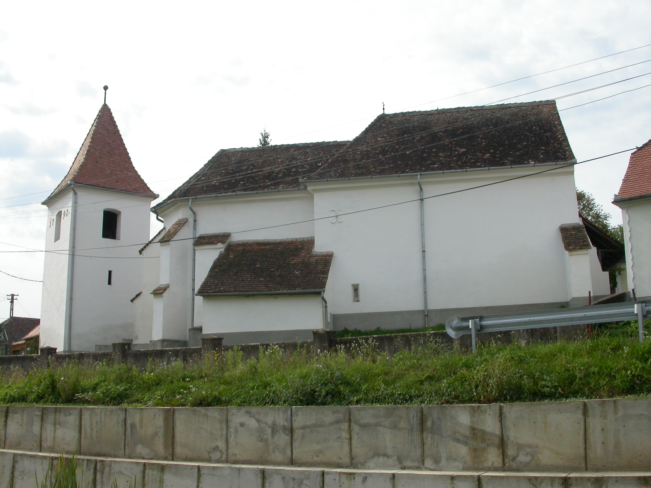 Ansamblul bisericii evanghelice, sec. XV - XVIII